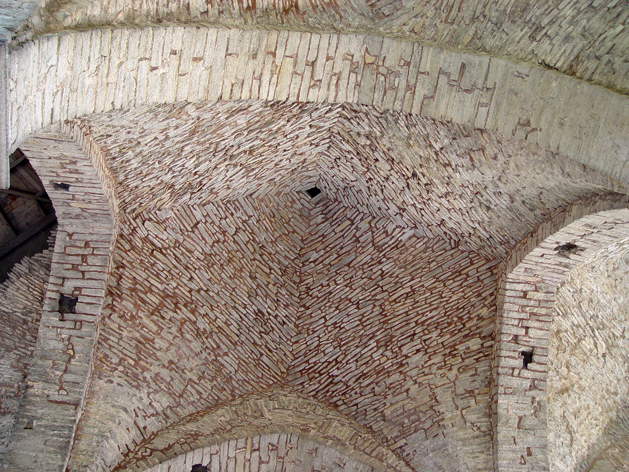 Kirchenruine St.Nicolai (St.Nicolaus) in Visby (Gotland). Erbaut 1230, zerstört 1525